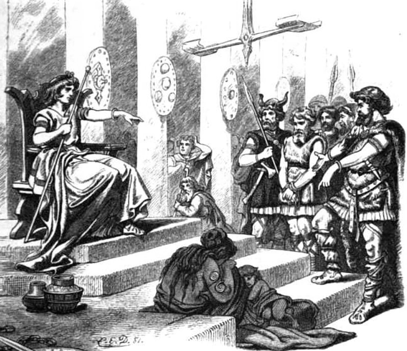 Forseti zu Gericht sitzend. Forseti sits in judgement, presumably in Glitnir.